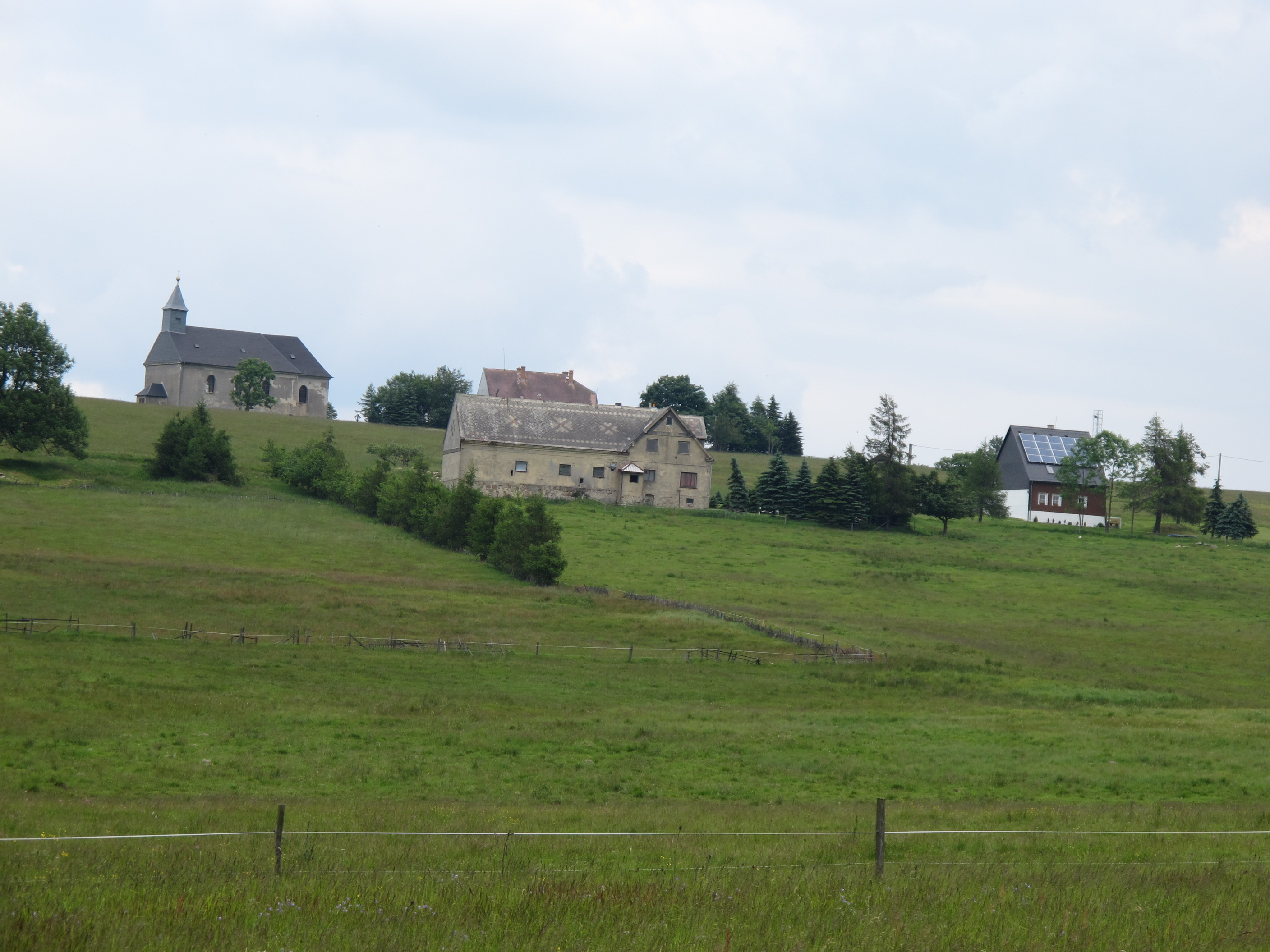 Malý Háj (osada Hory Svaté Kateřiny) - kostel a domky